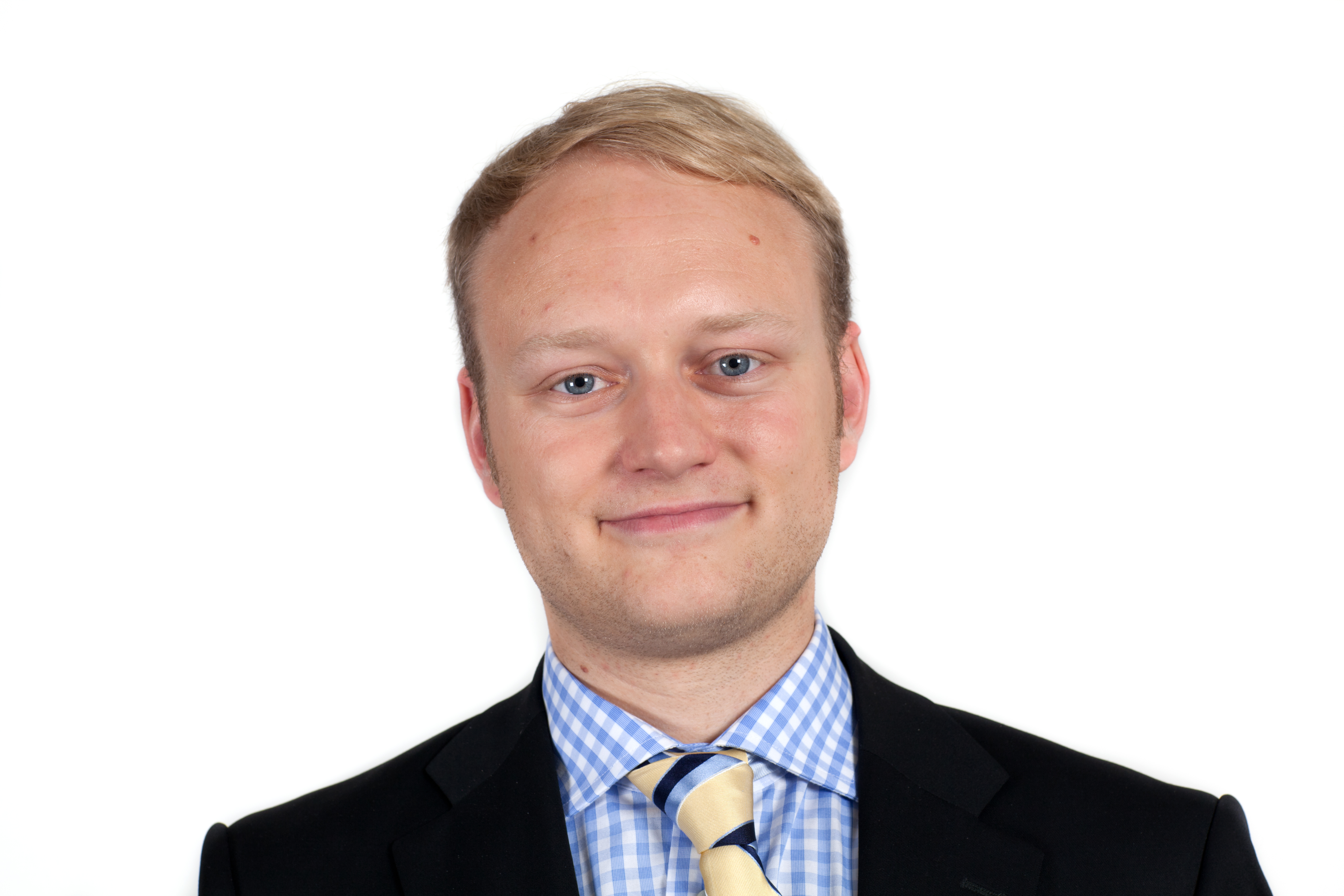 Poträtfoto von Michael Kruse (FDP), Geschäftsführer der FDP-Bürgerschaftsfraktion. Während des Projektes Hamburgische Bürgerschaft im Hamburger Rathaus.